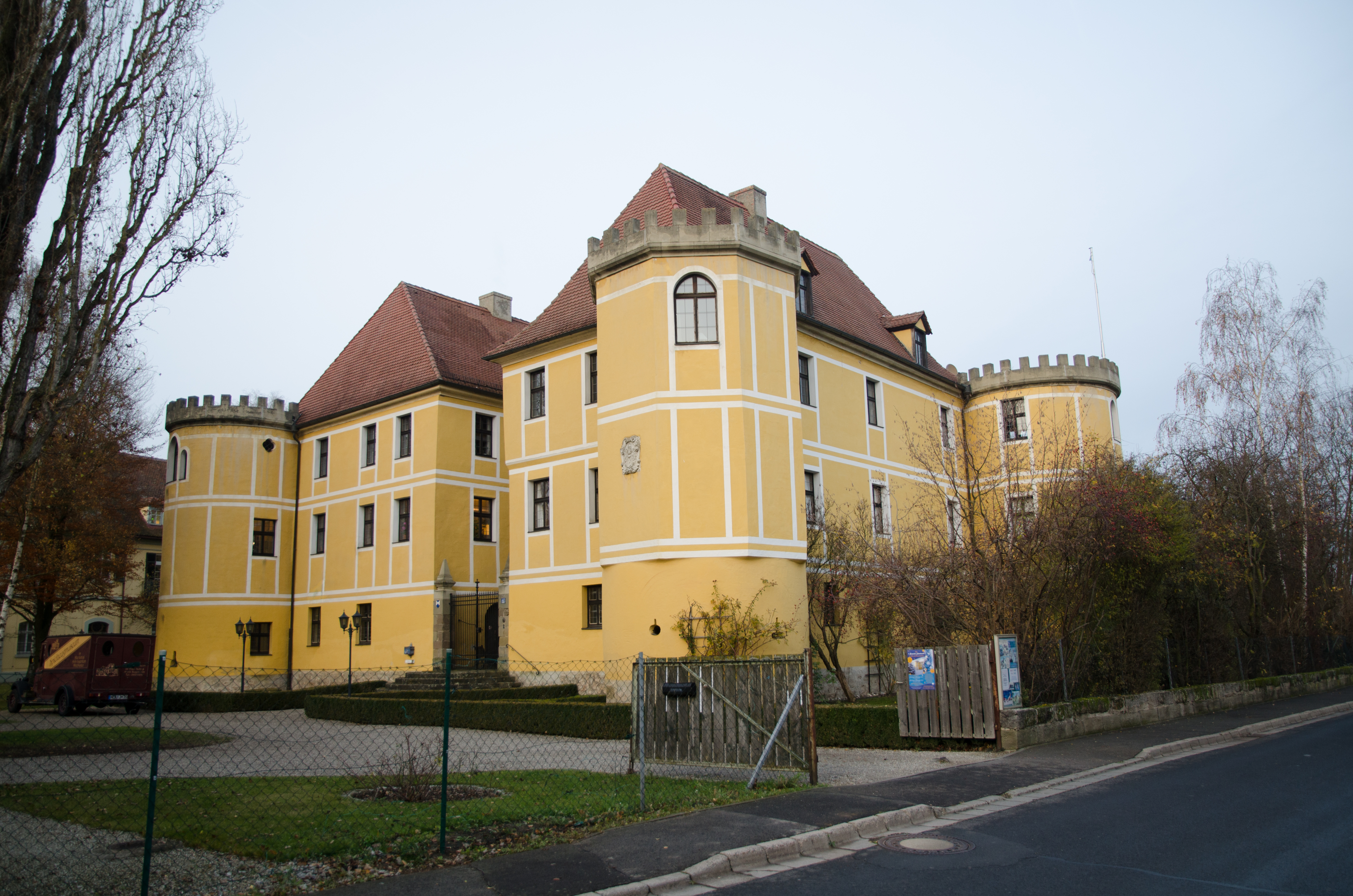 Sugenheim, Schloßstraße 47